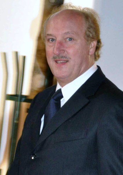 Bernard Farcy à la cérémonie des Césars 2010.